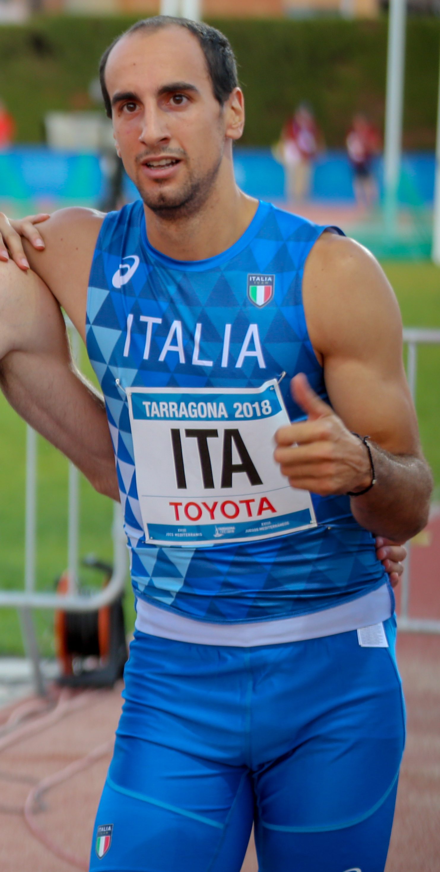 Italia en los relevos 4x400 en los Juegos del Mediterráneo 2018 (Matteo Galvan, Giuseppe Leonardi, Michele Tricca, Davide Re)